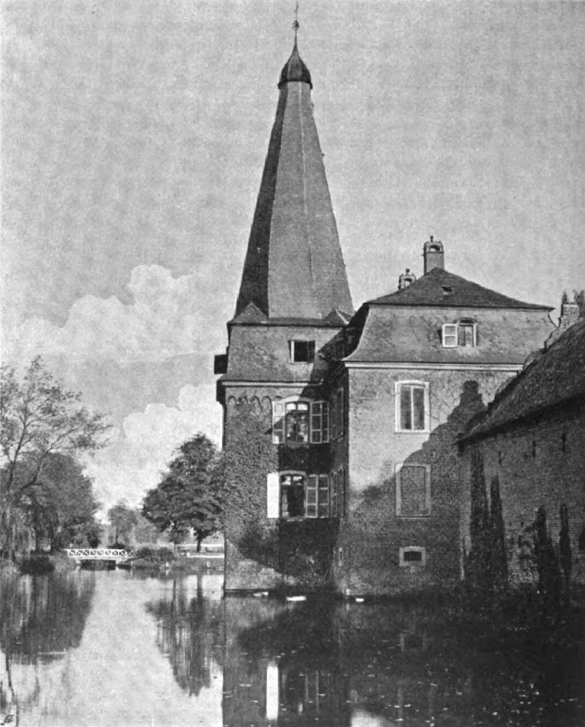 Der Turm des Herrenhauses von Schloss Linzenich vor seiner Veränderung im Jahr 1905